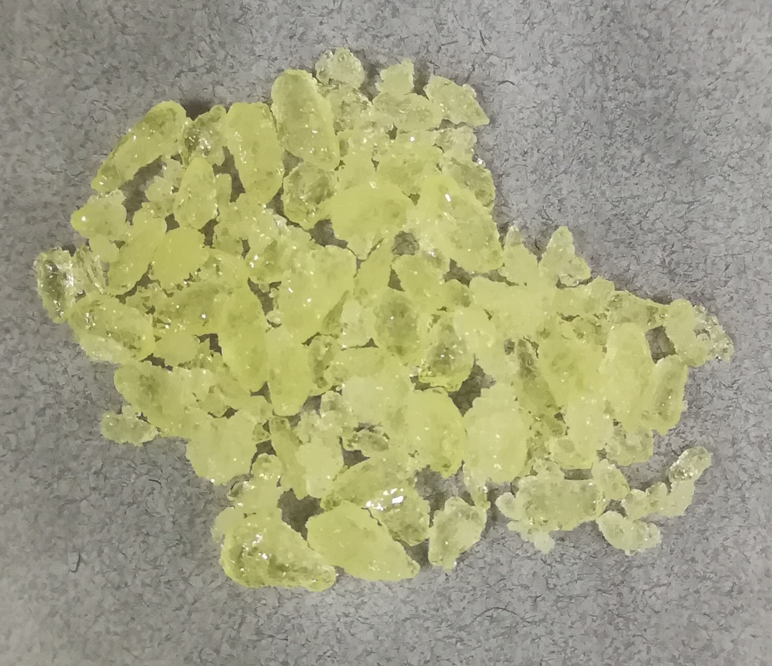 氯化镝(III)六水合物，纯度99.99%（Dy）